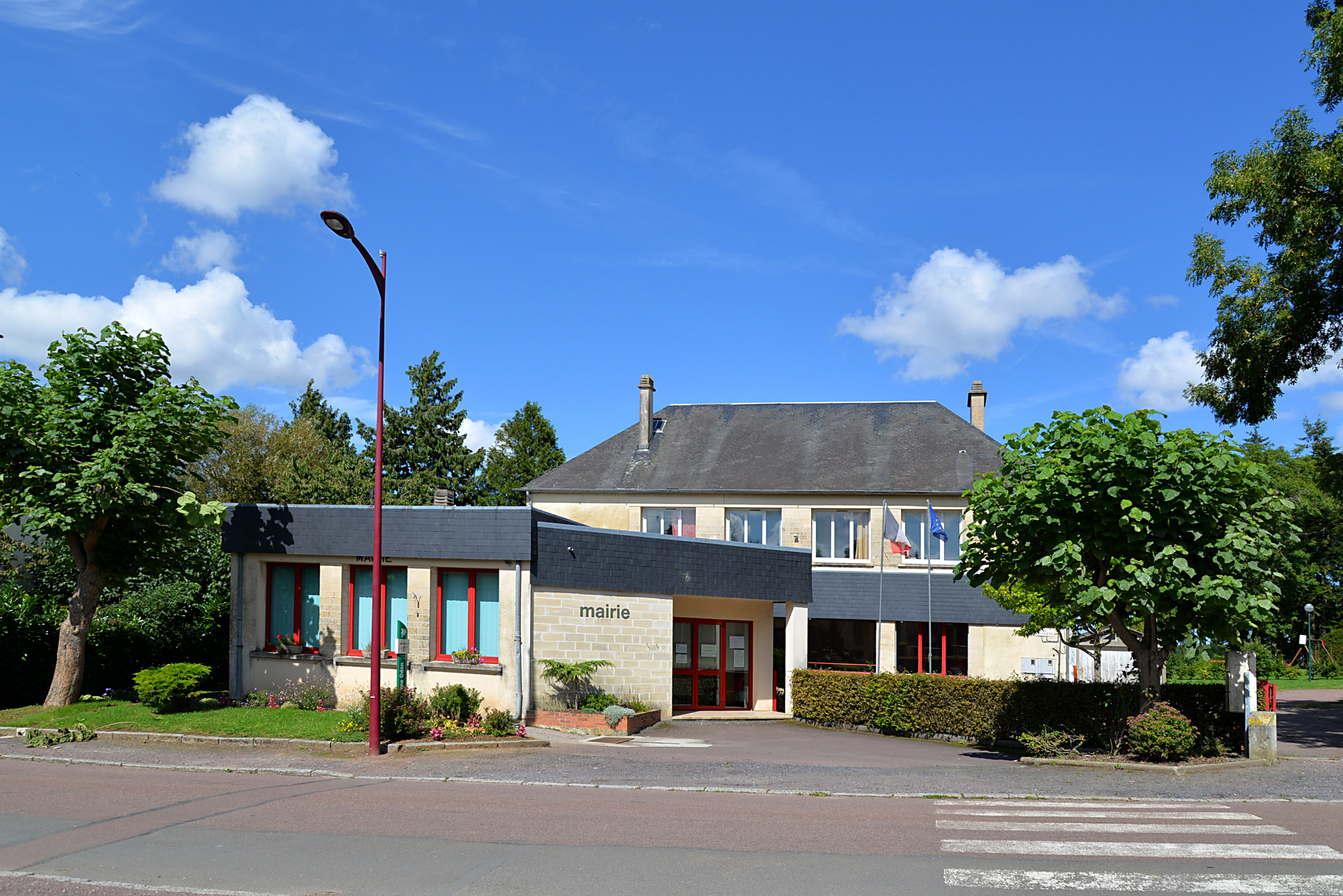 Gavrus (Calvados)